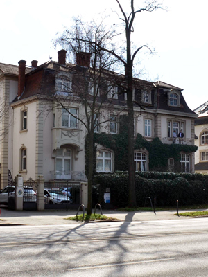 Haus Kennedyallee 99